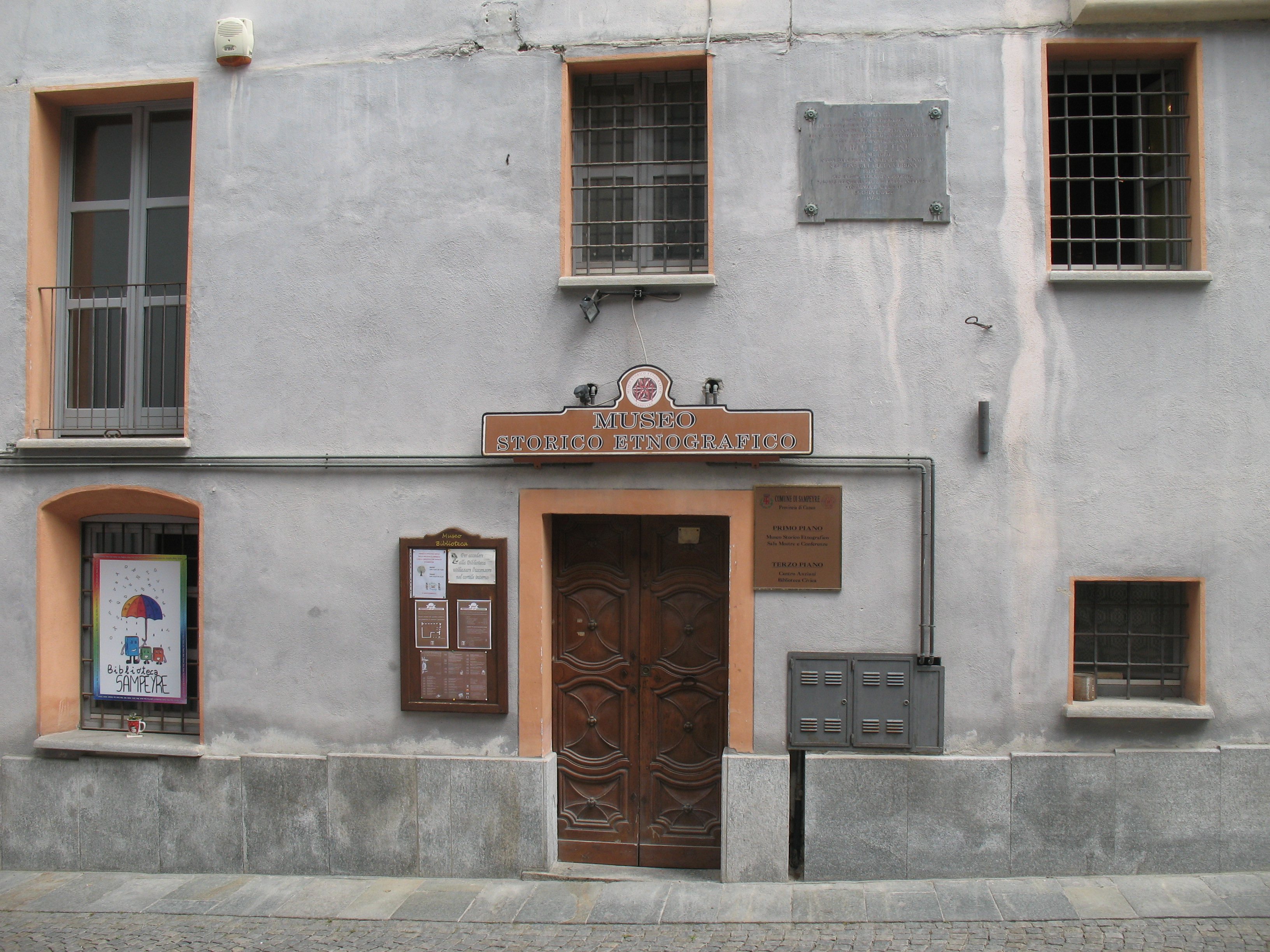 Museo Storico Etnografico, Sampeyre, Varaitatal, Piemont